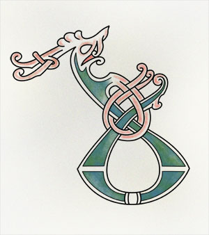 Psalter aus Cambridge, Großbritannien. Initiale D im Ringerike-Stil. 11. Jh.